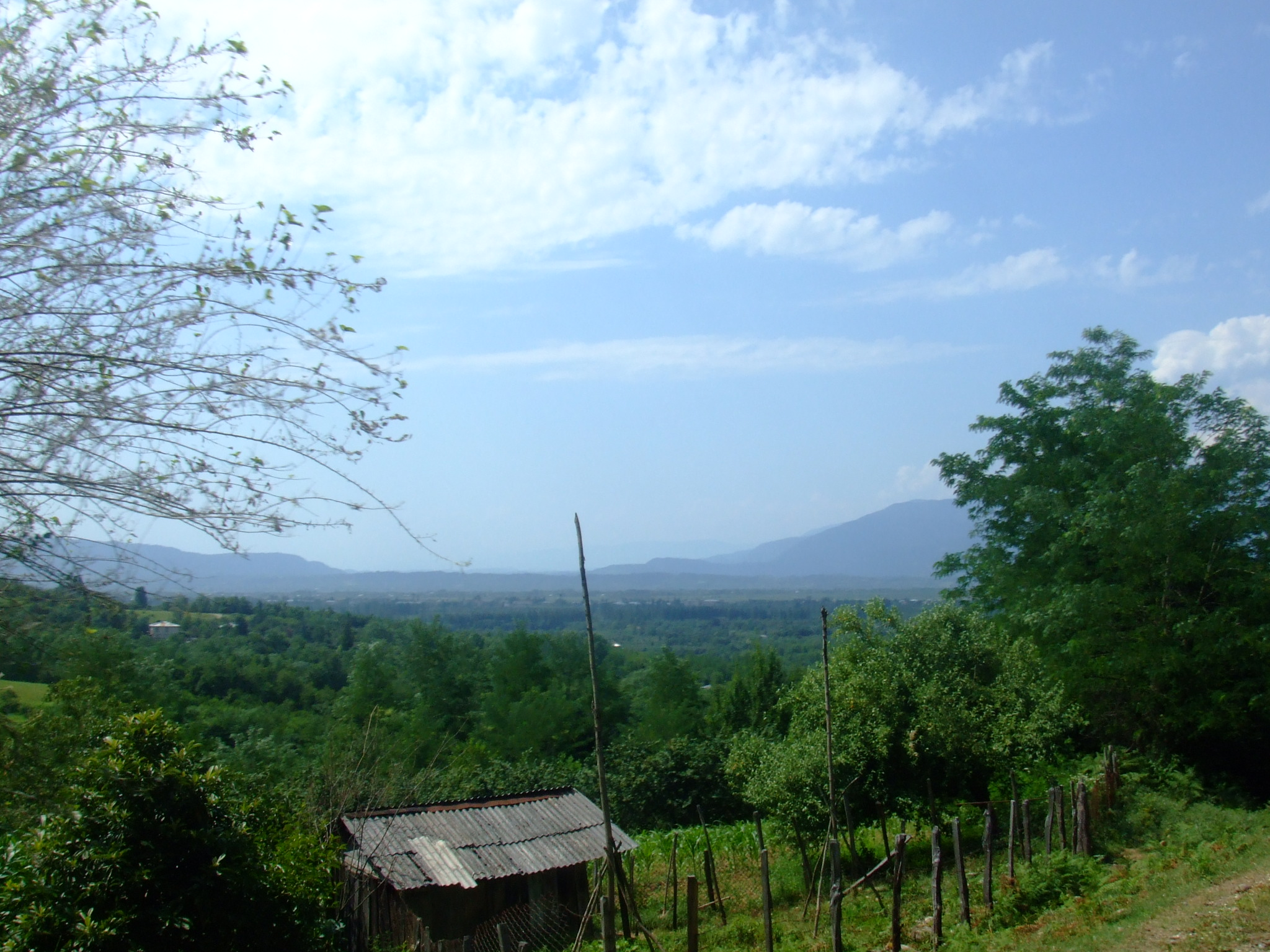 village korckheli in Zugdidi district